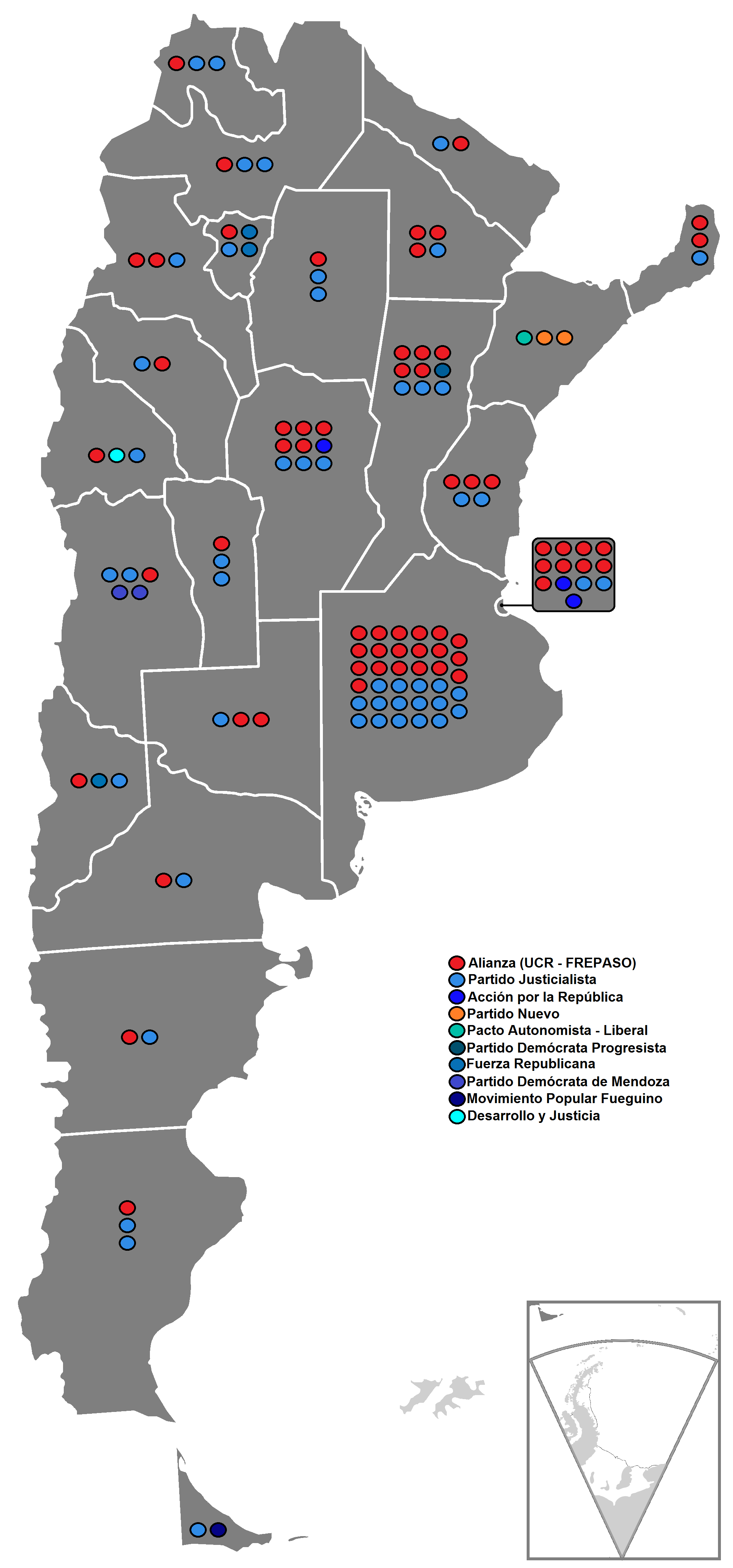 Resultado de la elección legislativa de Argentina por provincia.